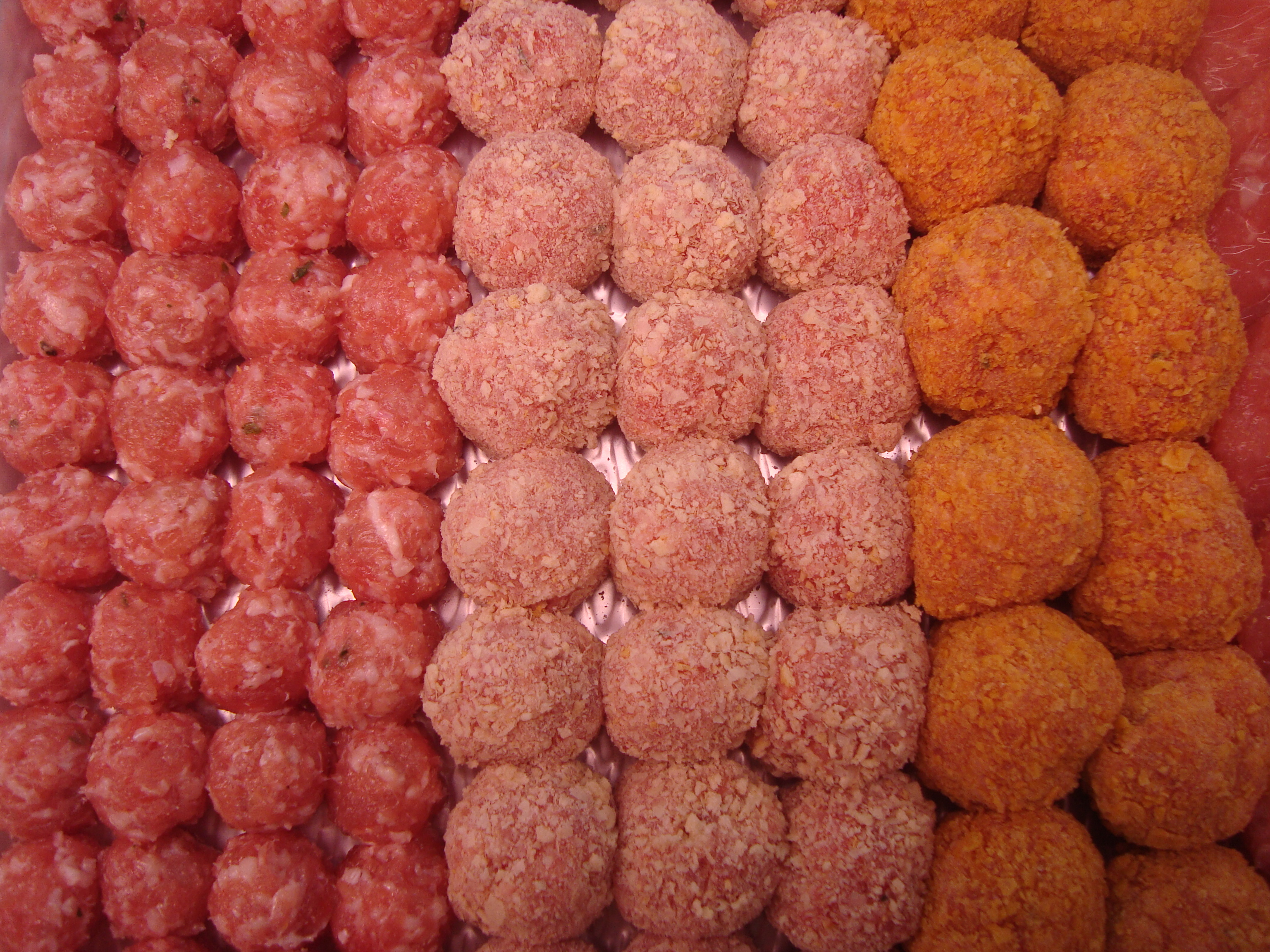 Albóndigas crudas, elaboración y venta en una carnicería tradicional de Torreblanca (Castellón)